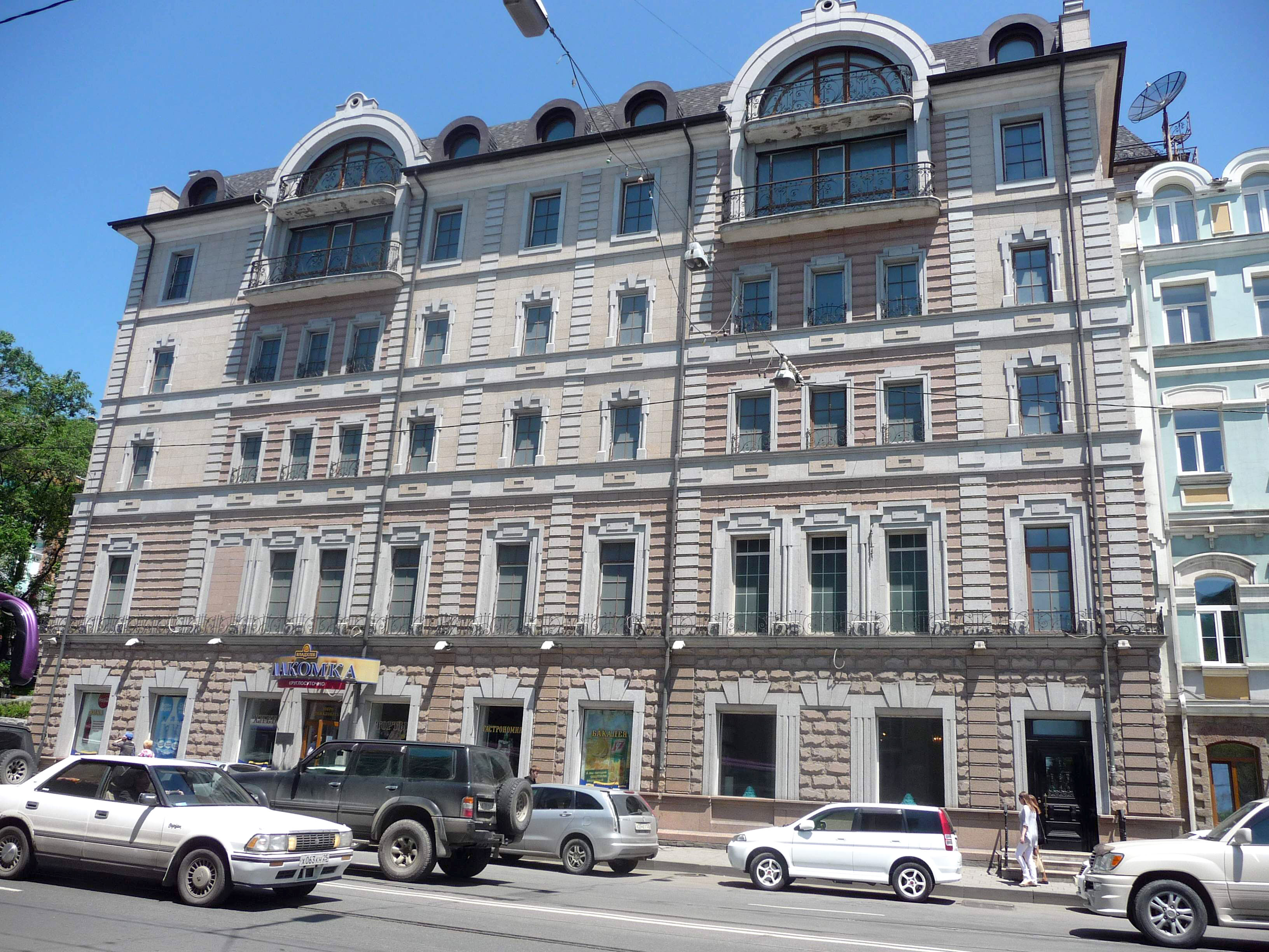 Владивосток, Светланская, 51, 2012-06-22